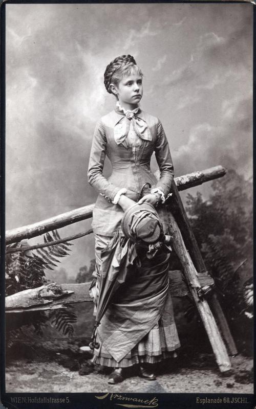 Herzogin Amalie in Bayern